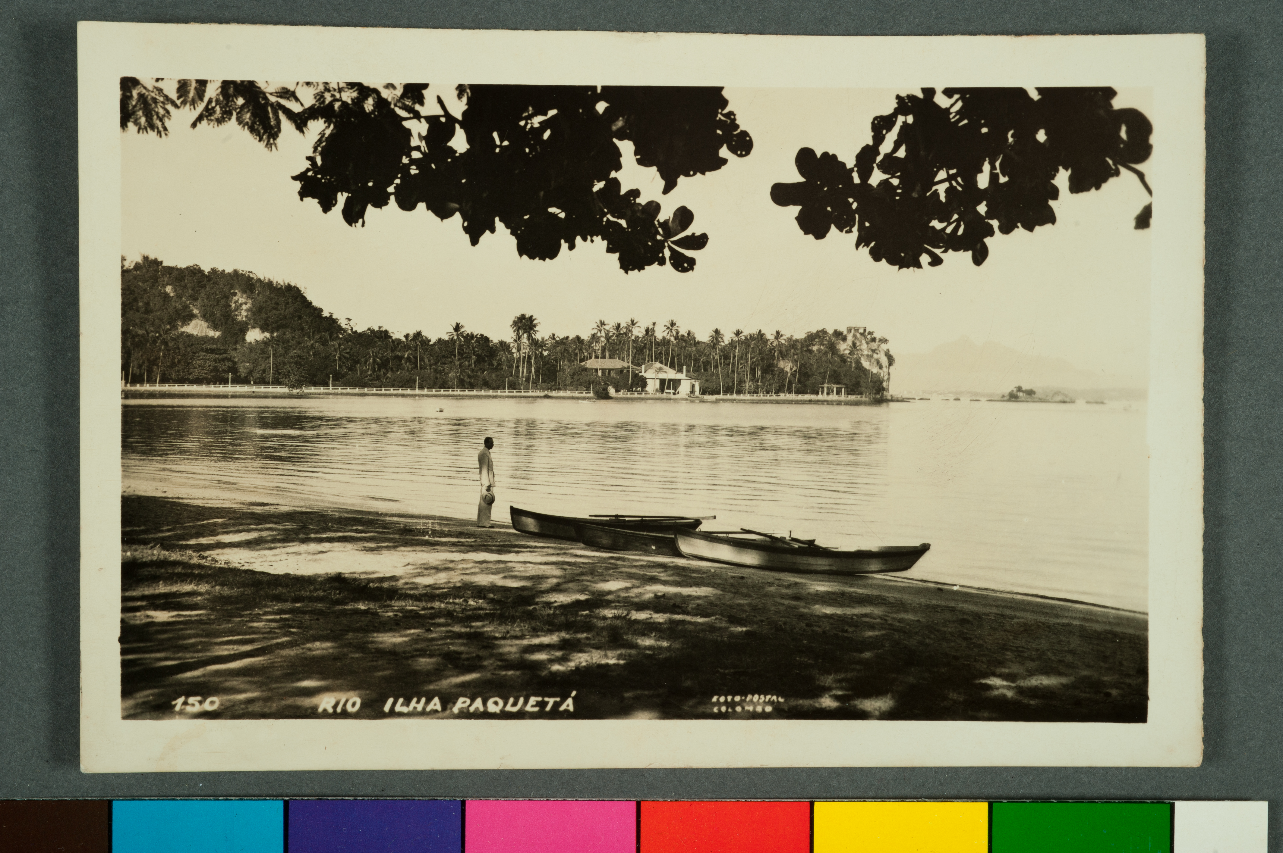 Obra que integra o acervo do Museu Paulista da USP. Coleção Cartões Postais. Ref. Agente: Photo Postal Colombo